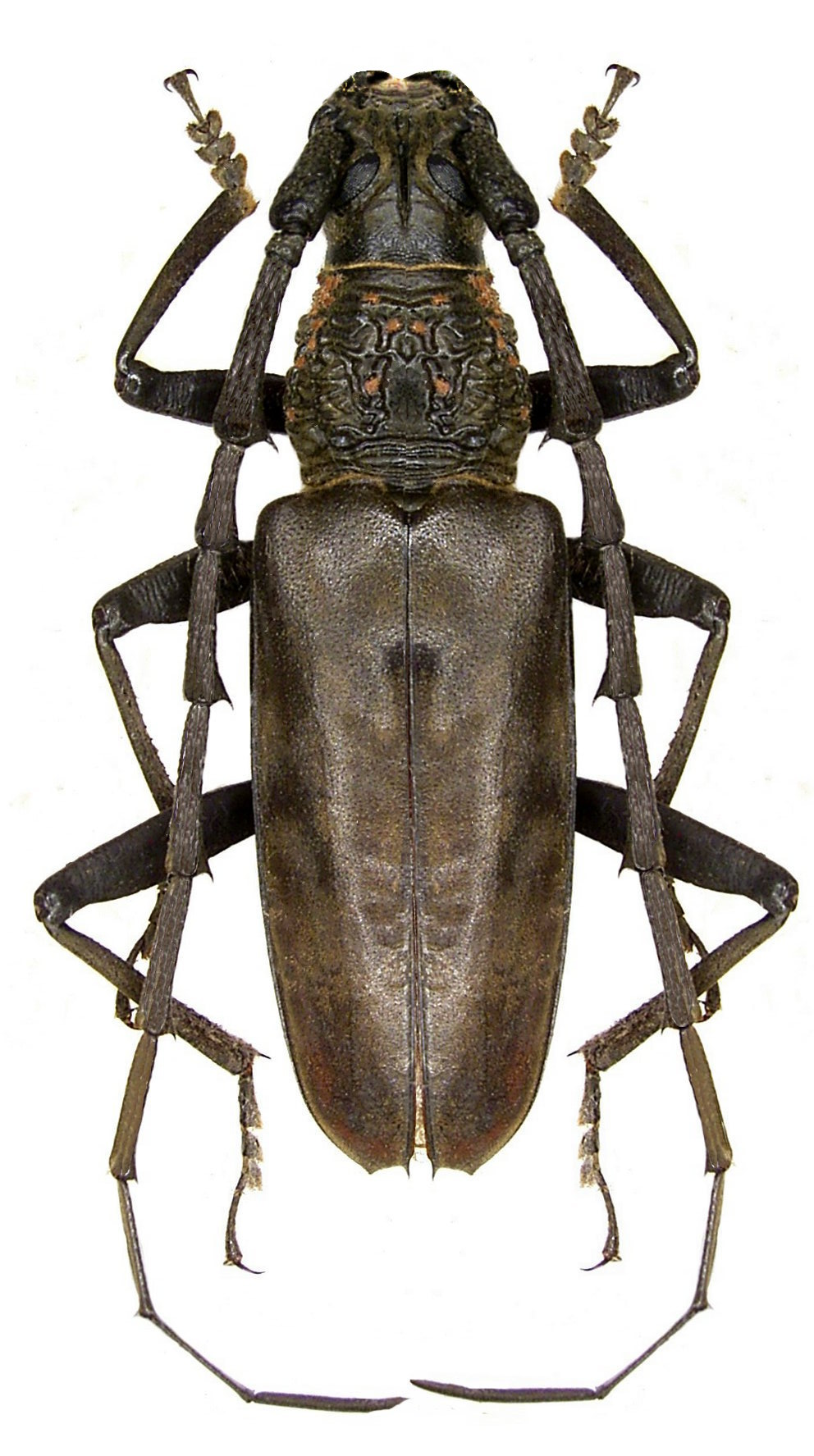 Familie: Cerambycidae Groesse: 55 mm Fundort: Vietnam, Yen Bai Prov., An Fu Country, 1996 det. A.Weigel Photo: U.Schmidt, 2006